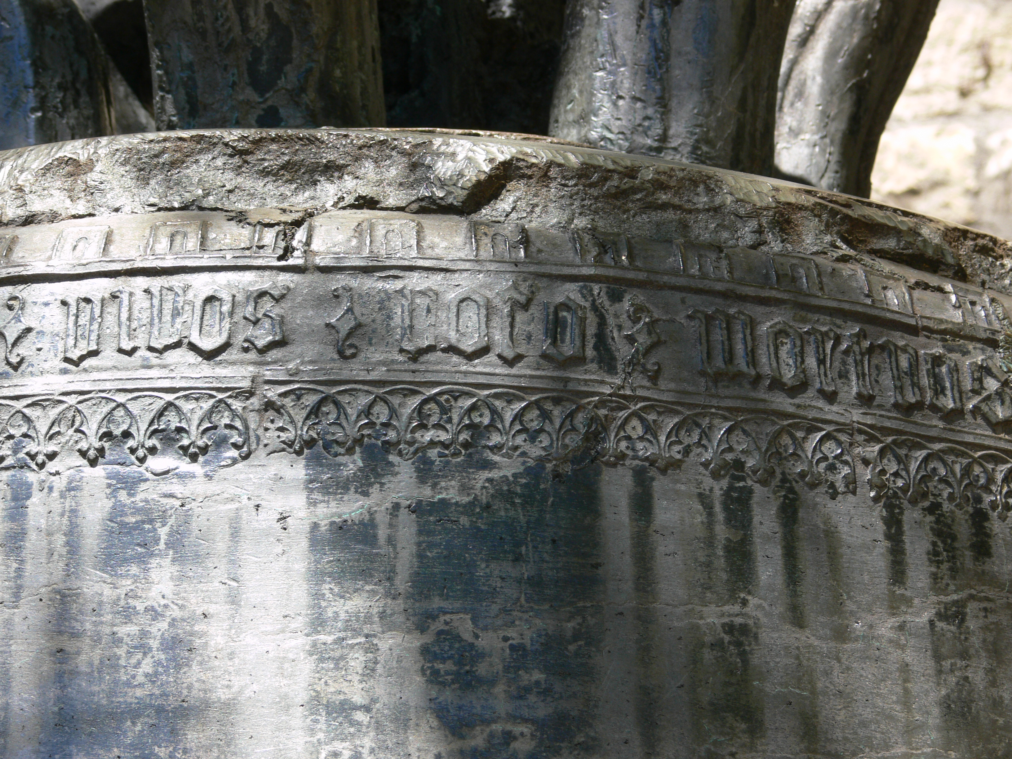 Schaffhausen, Schillerglocke Inschrift: vivos voco mortuos plango fulgura frango miserere domine populo quem redemisti sangvine tuo anno domini m ccc l xxxvi